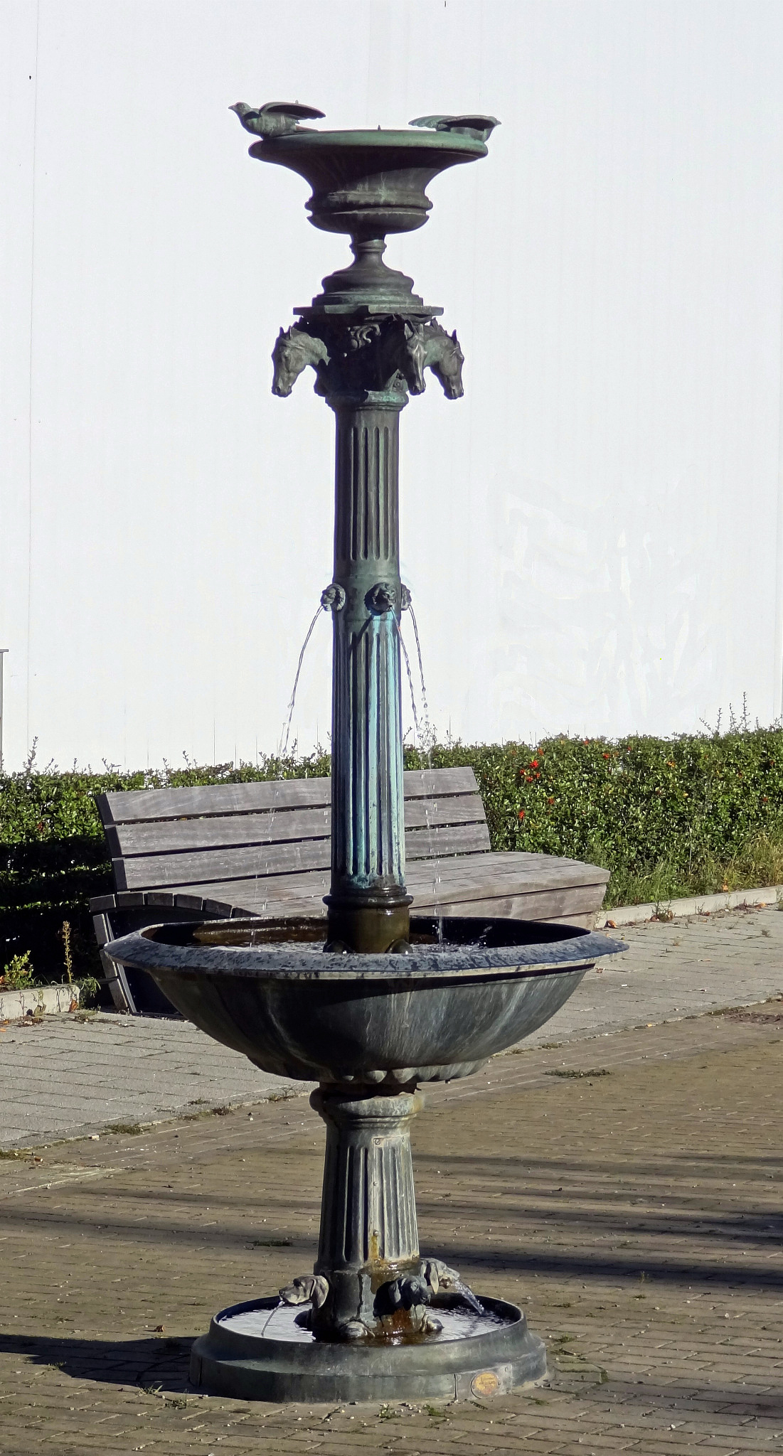 Pferdebrunnen-III , Auf dem Wartburgplatz in Bremen